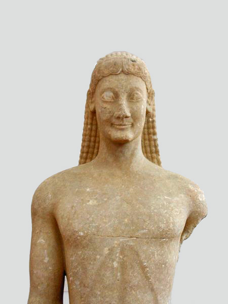 Kouros (young man)